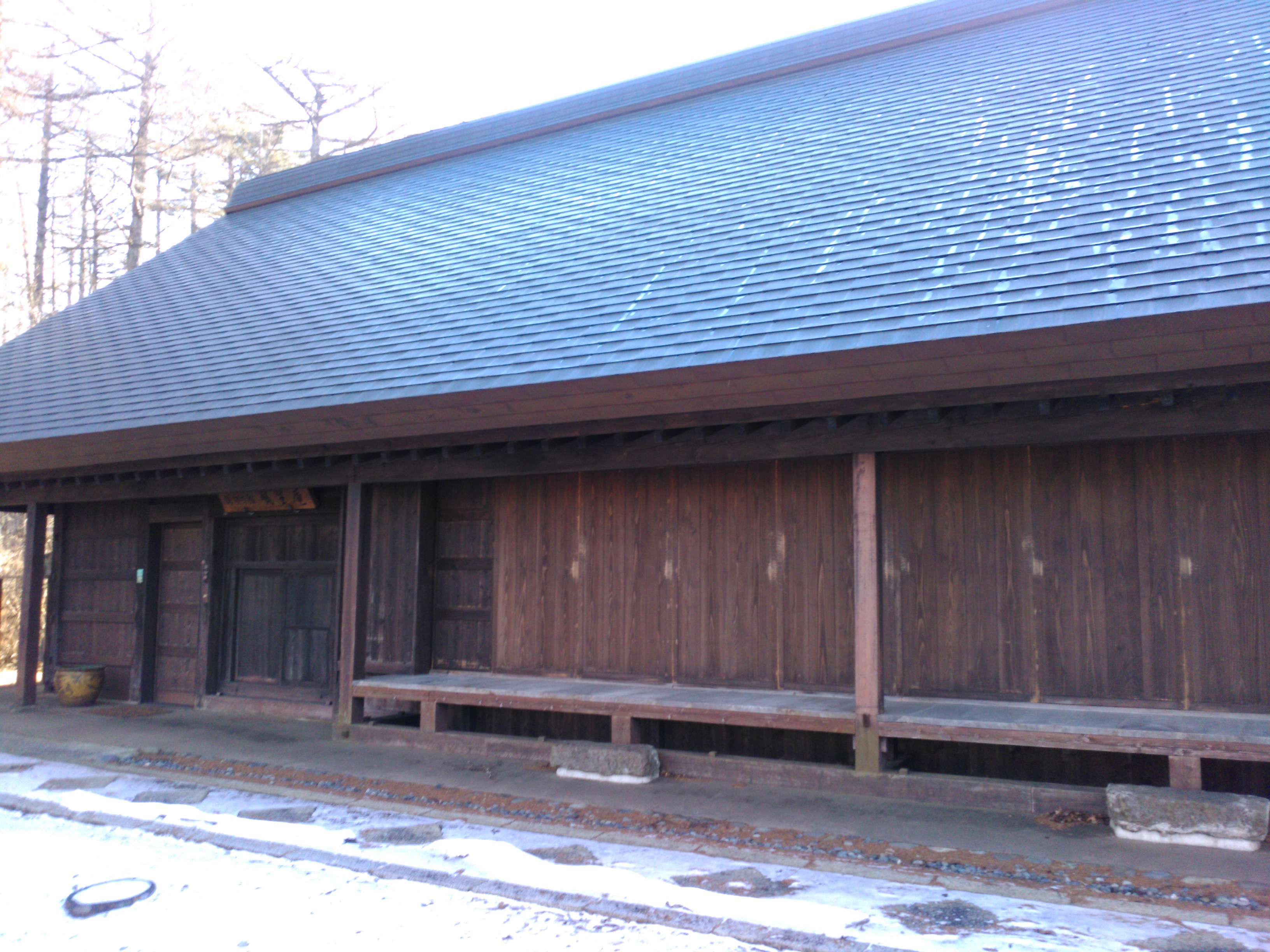 風生庵（山名湖村）